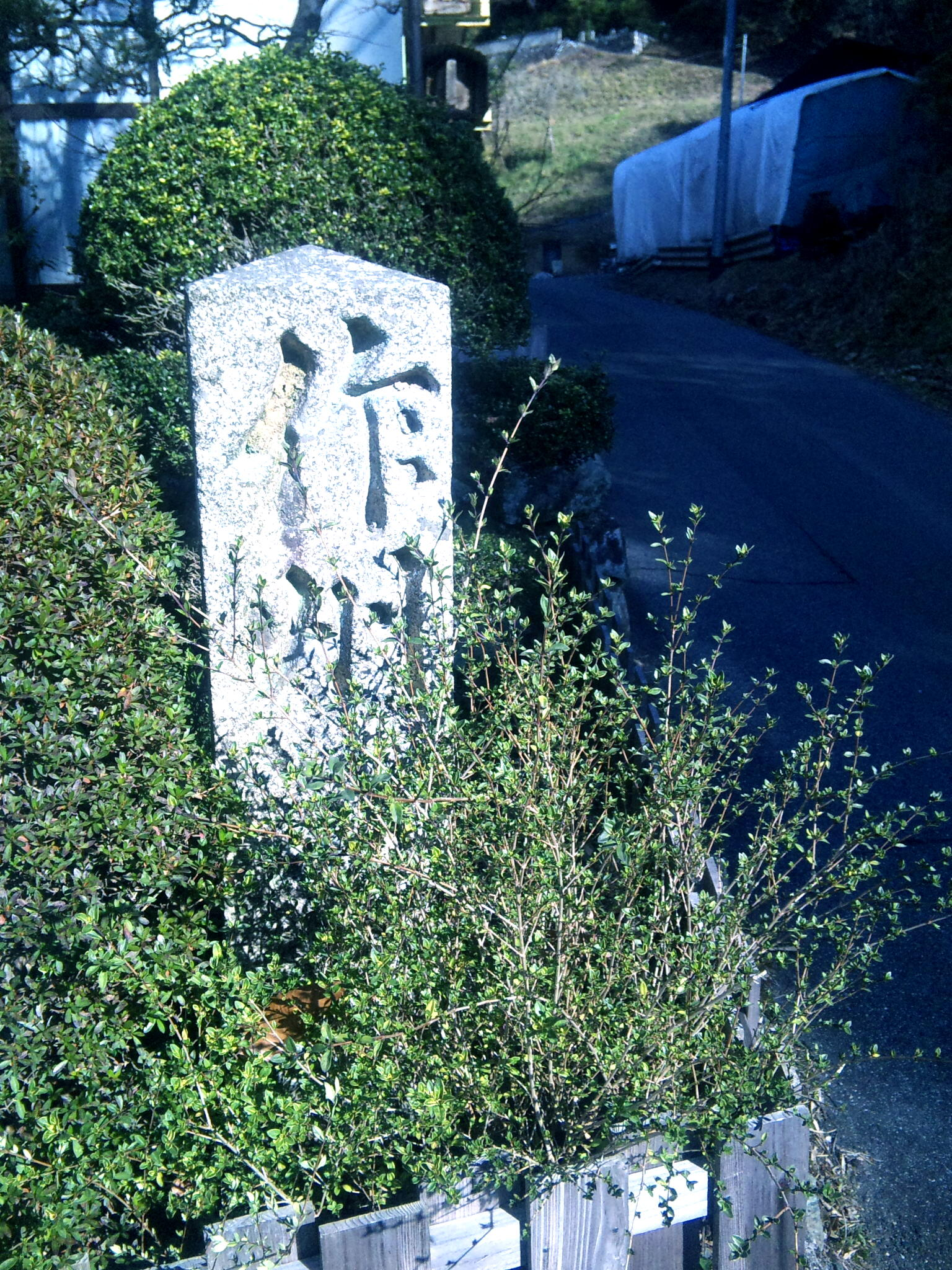 「禅洞山 永祥寺」 門前の南にある旧作州街道の道標。 「作州 なりわ まつやま 道」 と案内している。 （岡山県井原市西江原町才児）